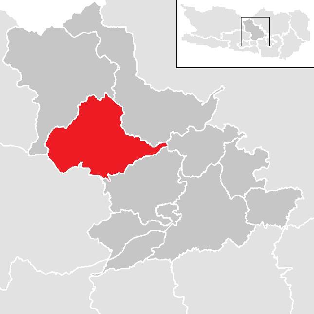 Bezirk Feldkirchen